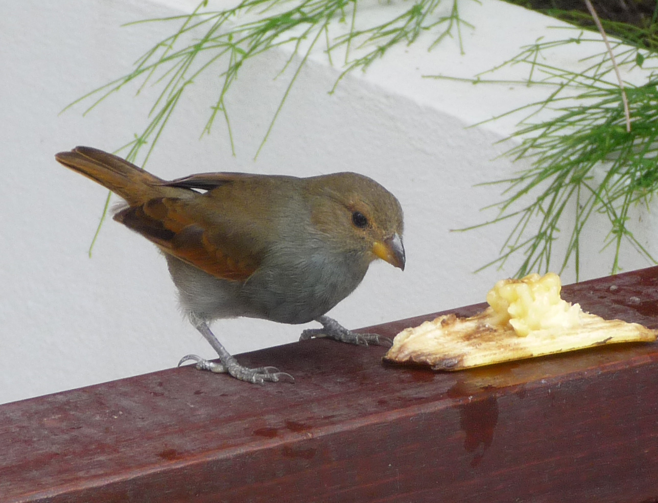 Lesser Antillean Bullfinch.Loxigilla noctis. Female. Endemic